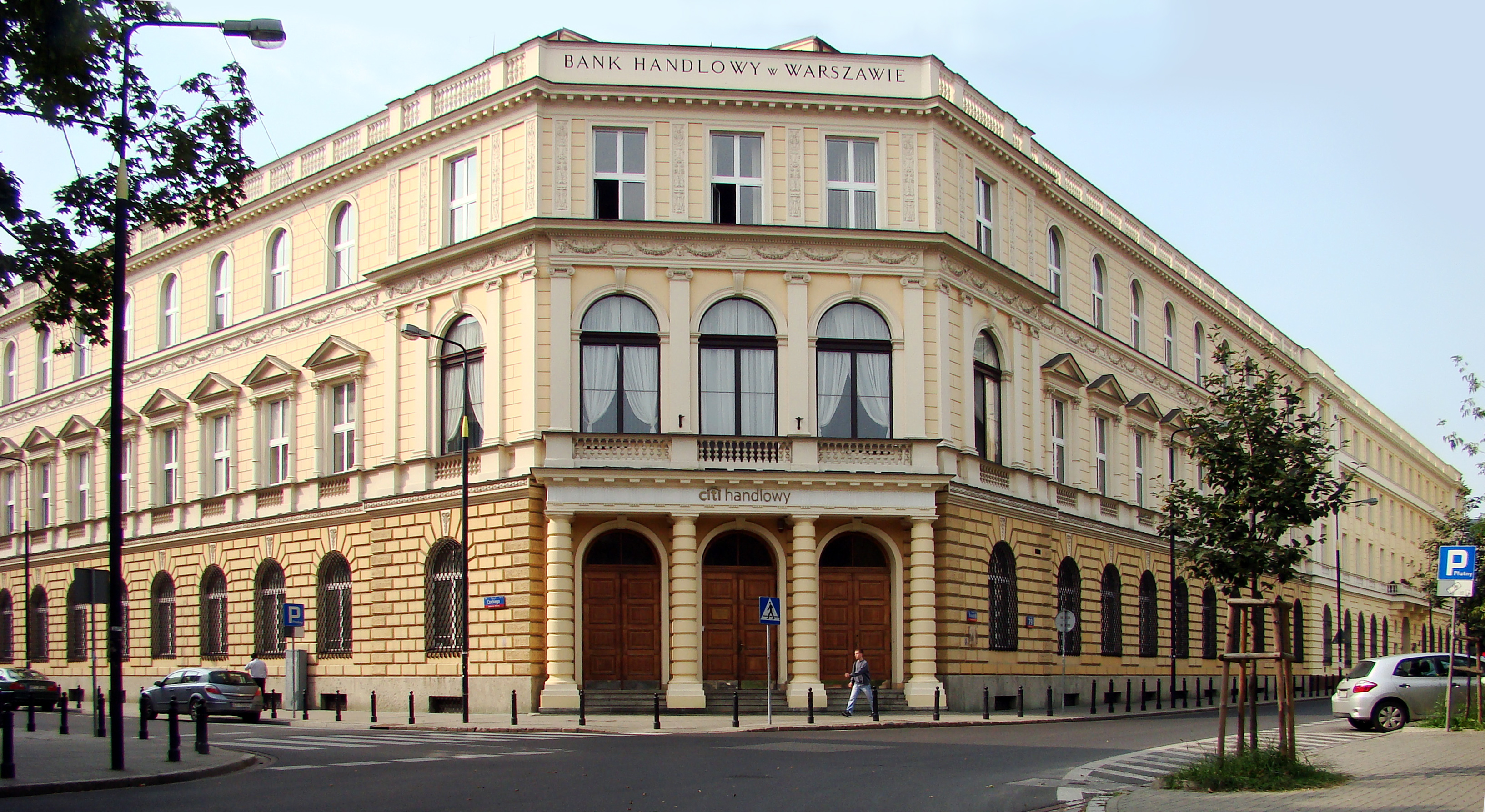 Bank Handlowy - Warszawa, Romualda Traugutta 7/9